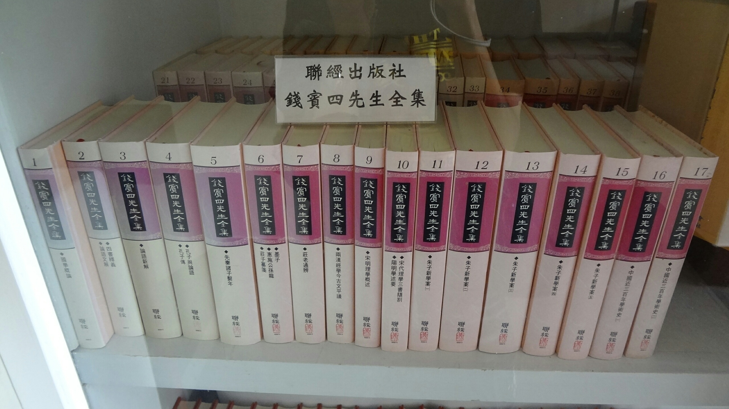 錢穆故居展示的聯經出版精裝書《錢賓四先生全集》。